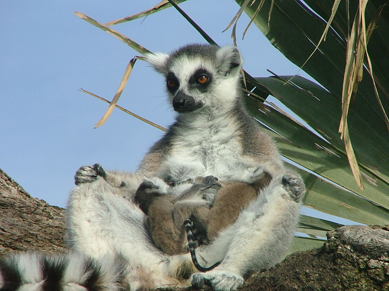 Lémur de cola anillada: De hábitos más terrestres que otras especies, el lémur de cola anillada se encuentra en distintos tipos de bosque dentro de su área de distribución, desde los secos y caducos, a los de galería, donde sus poblaciones son más abundantes. Según la estación comen preferentemente hojas, flores hierbas o frutos, y tienen una especial predilección por el tamarindo. Es una especie social que vive en grupos de hasta 20 individuos. Las hembras permanecen en su grupo natal y son dominantes sobre los machos. Paren una sola cría. Sus voces de alarma distinguen entre predadores alados –que sólo cazan crías- y terrestres, y el grupo reacciona en consecuencia. Ambos sexos poseen una glándula en las muñecas que producen una secreción olorosa usada para marcar su territorio. A veces frotan su cola con ella y la mueven suavemente al andar para dispersar el olor.